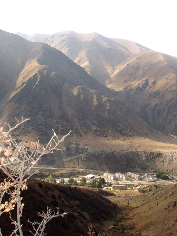 Ущелье, в котором находится санаторий